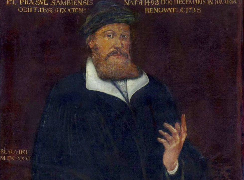 Ein Gemälde des Reformators Andreas Osiander (1498–1552), schmückte anlässlich des Lutherjahres 2017 die Kanzel der Kirche von St.Lorenz in Nürnberg